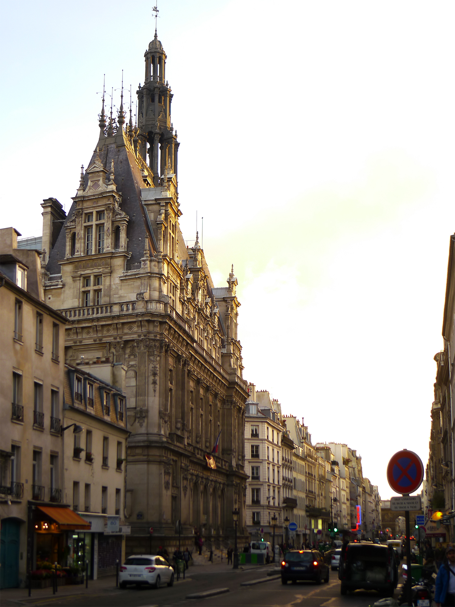 Rue du Faubourg-Saint-Martin au niveau de la mairie du Xe arrondissement - Paris X